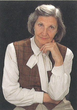 Foto von Friederika Richter